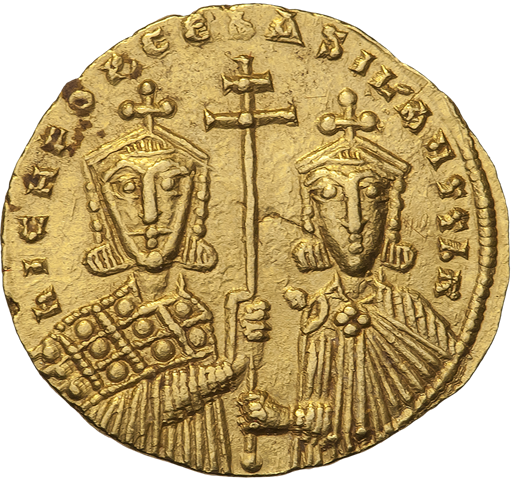 Номисма стамена. Никифор II Фока, Василий II, Константин VIII. Ок. 963—969 гг. (реверс). Слева погрудный портрет императора Никофора II с короткой бородой и справа Василия, без бороды; оба держат между собой длинный крест.